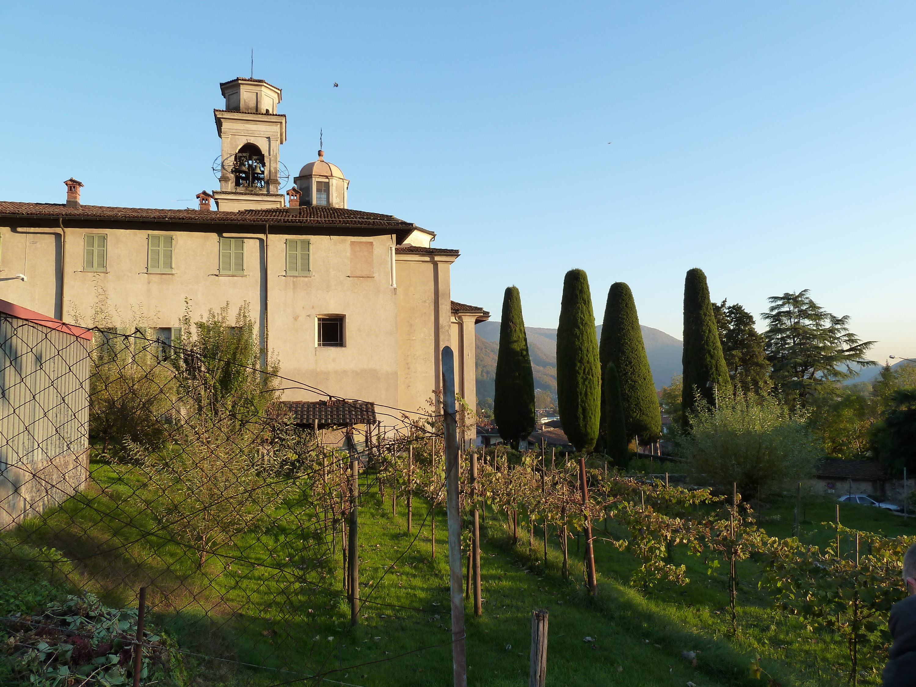 Chiesa parrocchiale dei SS.Biagio e Macario con casa parrocchiale